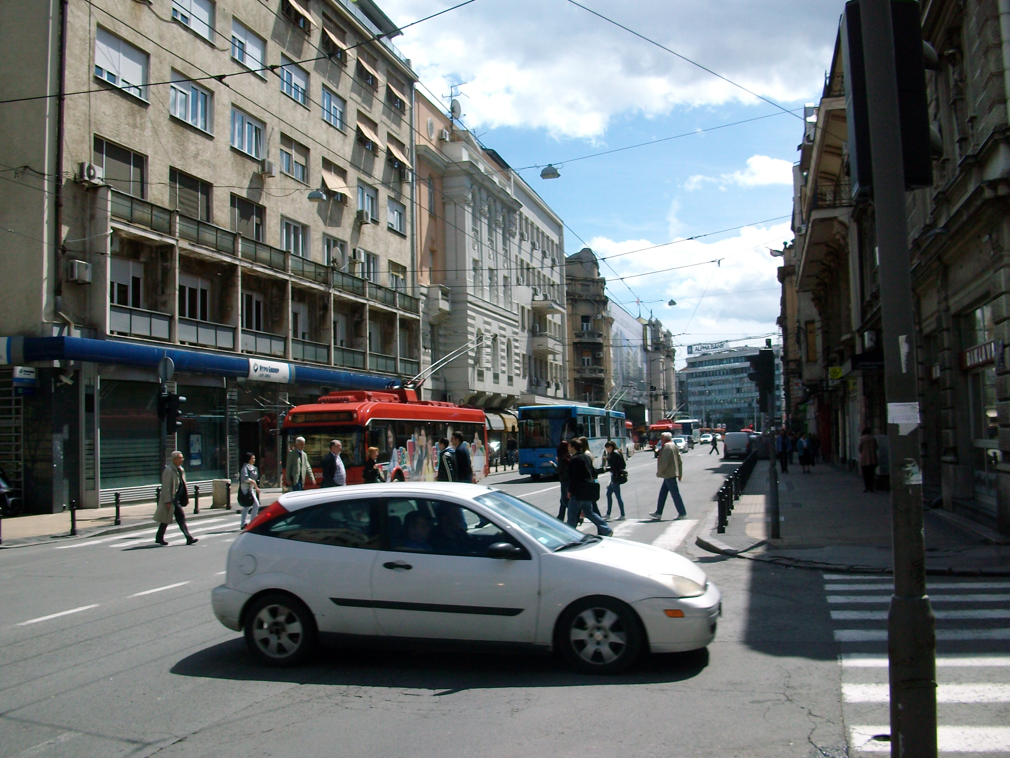 Васина улица